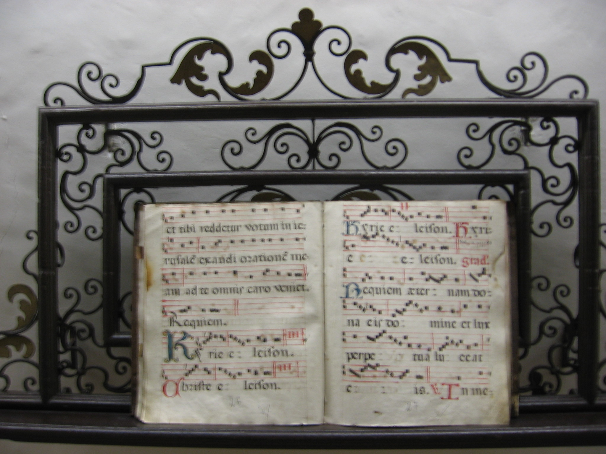 Museo arte sacra, Alzano Lombardo, BG